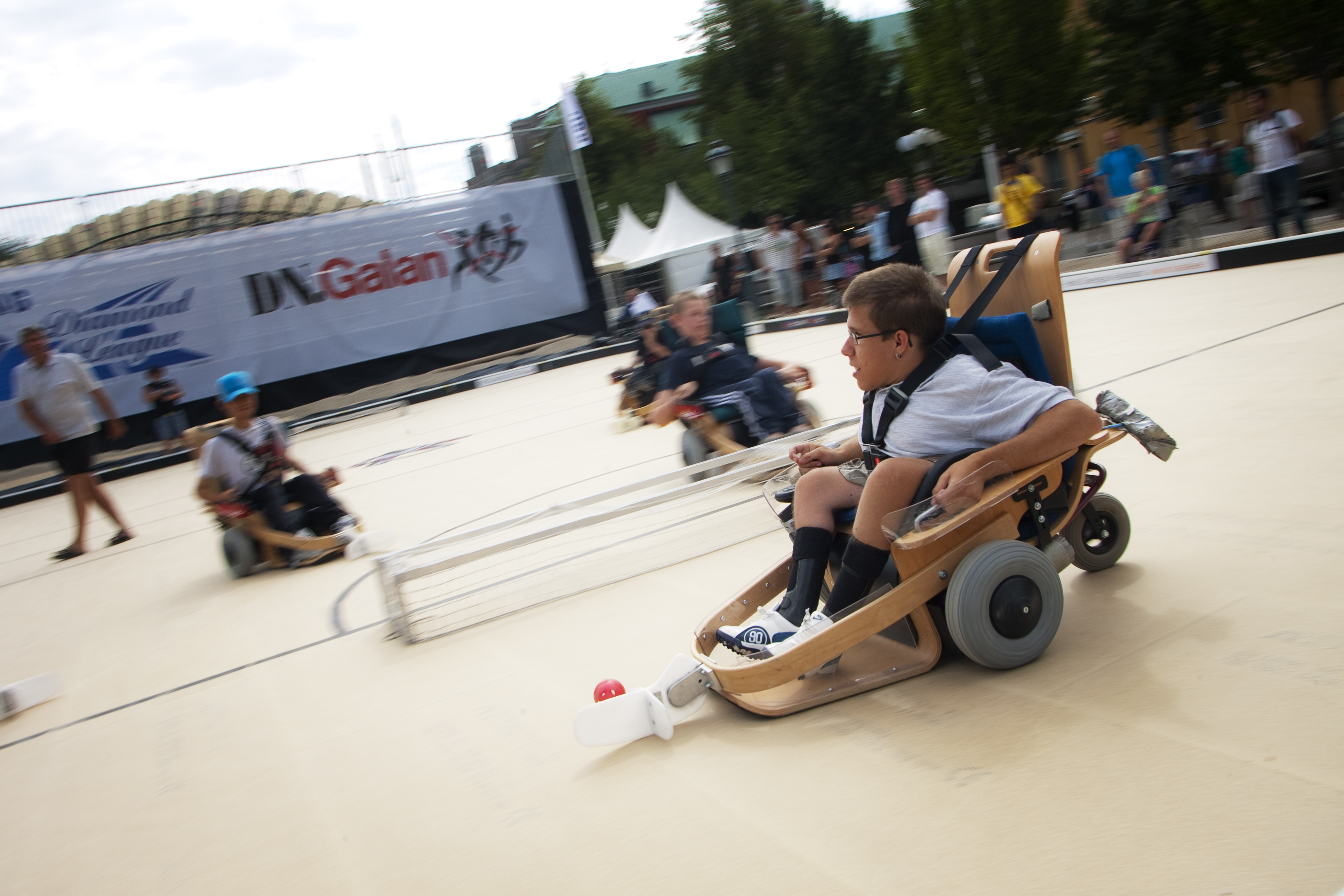 El-hockey i RBUs arrangemang under Lilla DN-Galan 2011 i Kungsträdgården, Stockholm